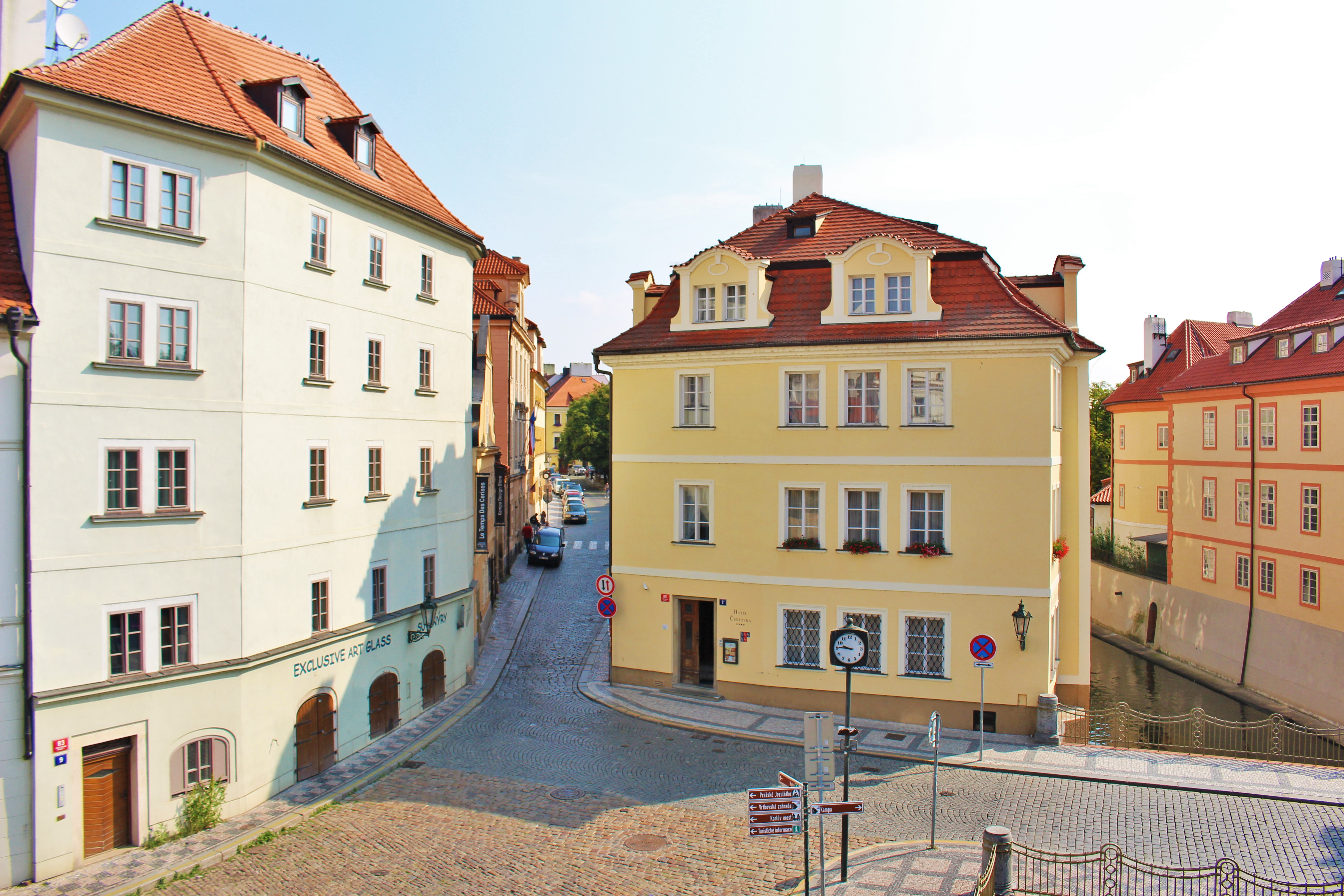 Pohled na ulici U Lužického semináře z Karlova mostu.